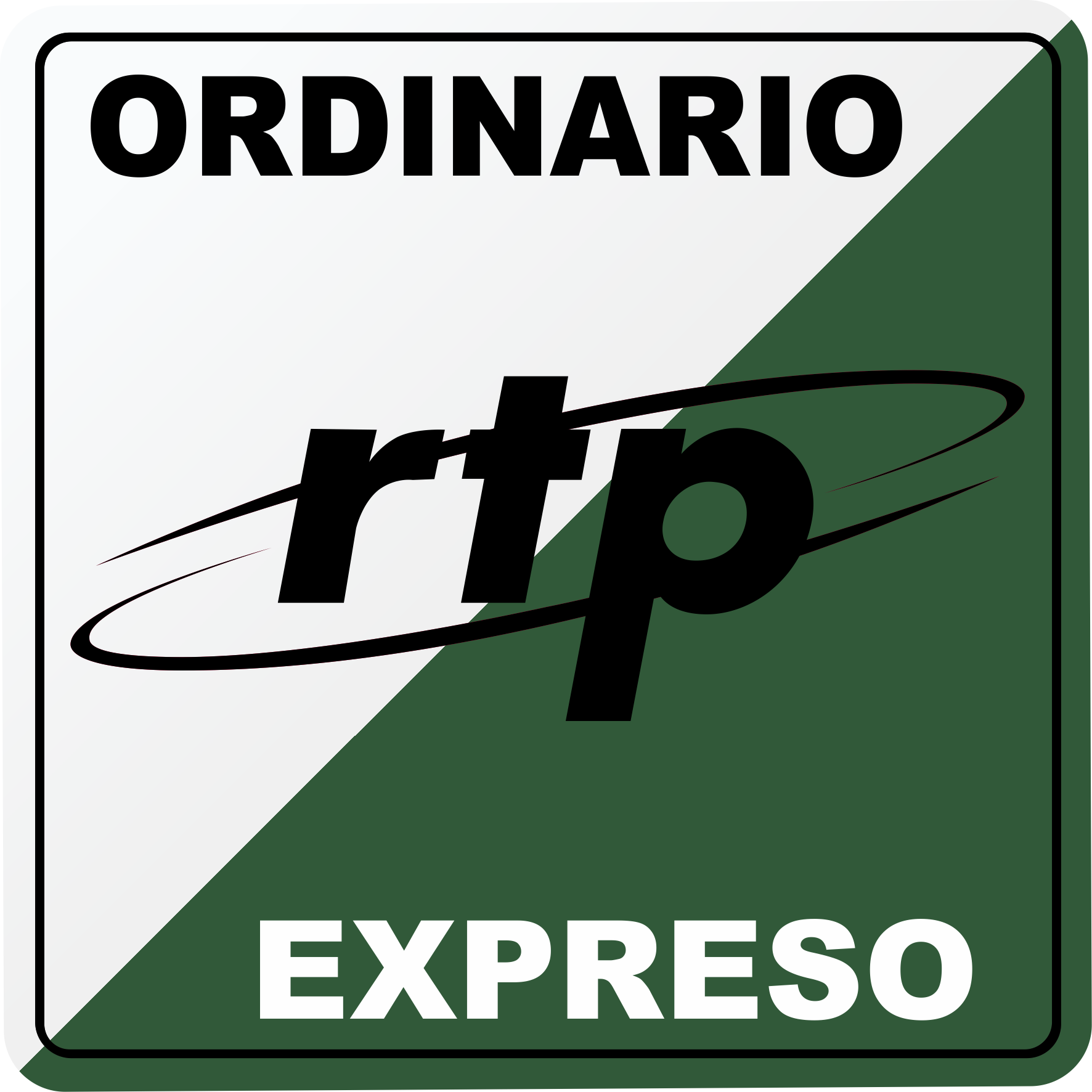 Parada RTP